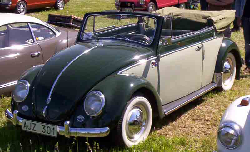 Volkswagen Type 1 Cabriolet 1953.